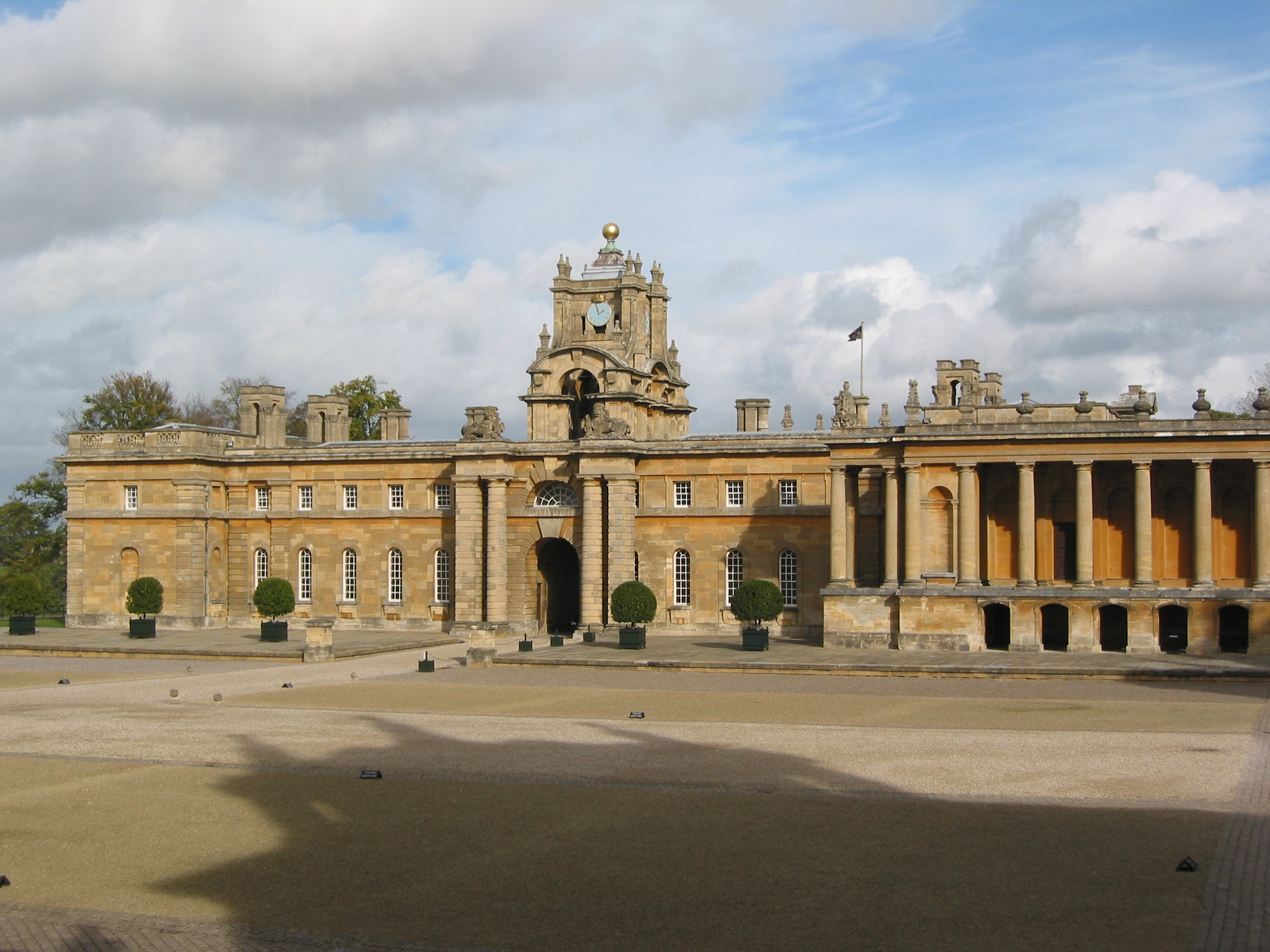 Blenheim Palace